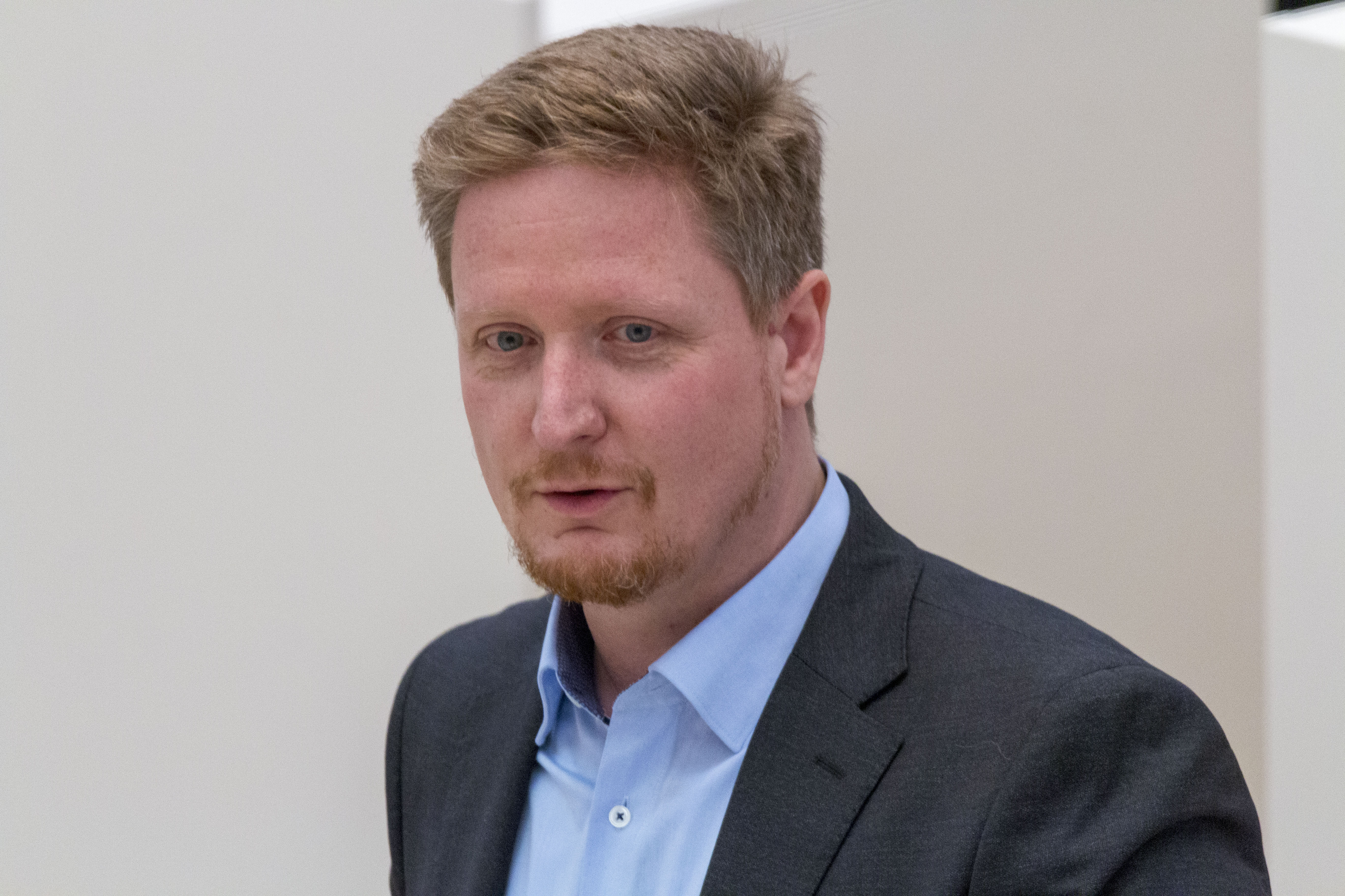 Sebastian Rüter am 22. Januar 2020 während einer Plenarsitzung im Landtag Brandenburg.